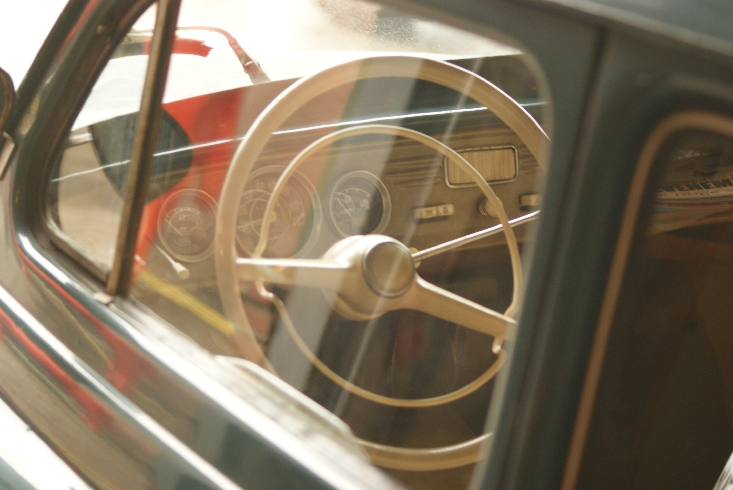 AH-67-18 Oldtimerdag Ederveen 2014